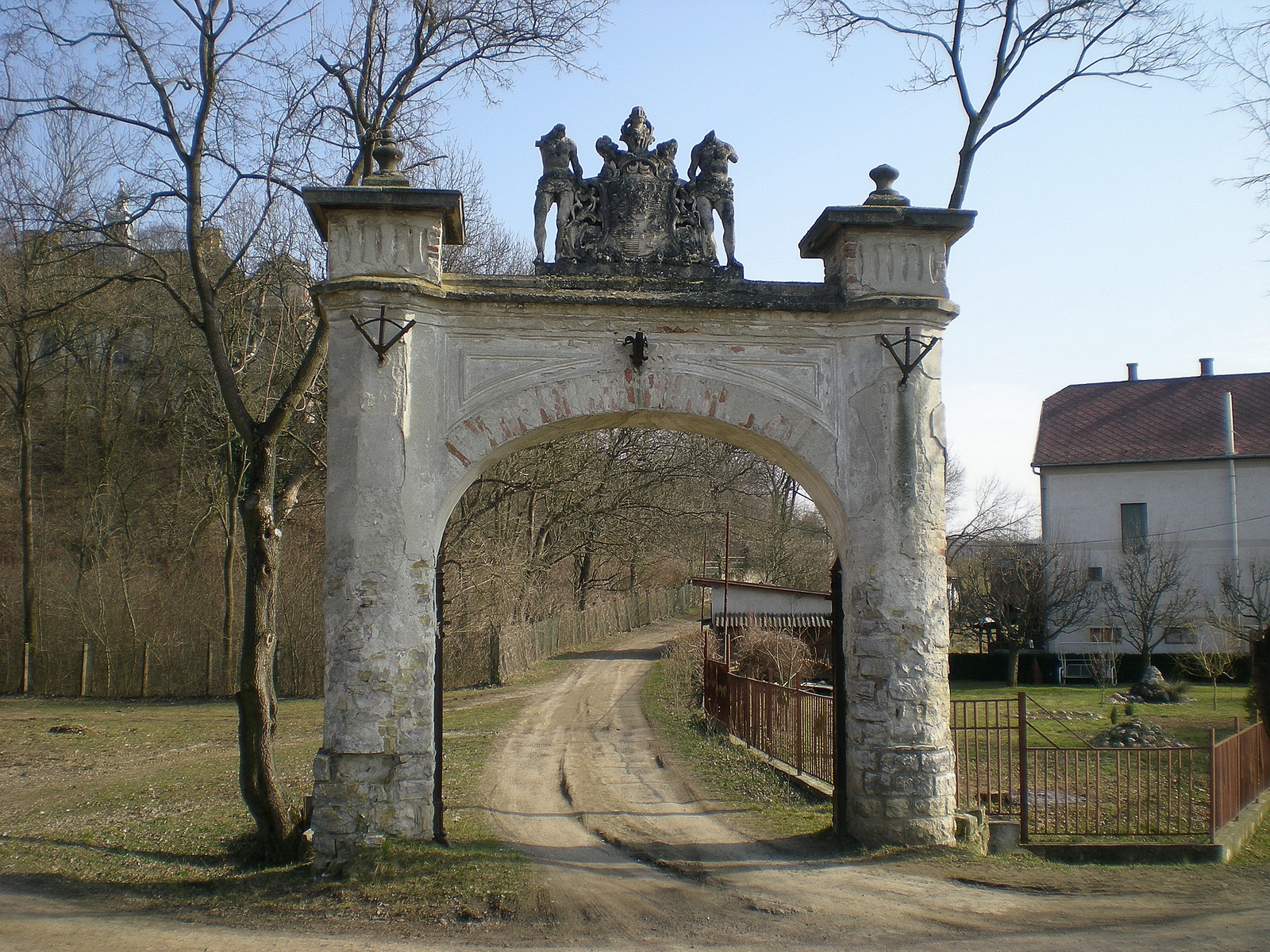 v. Prónay-kastély (Acsa, Petőfi u.) This is a photo of a monument in Hungary, Identifier: 6879